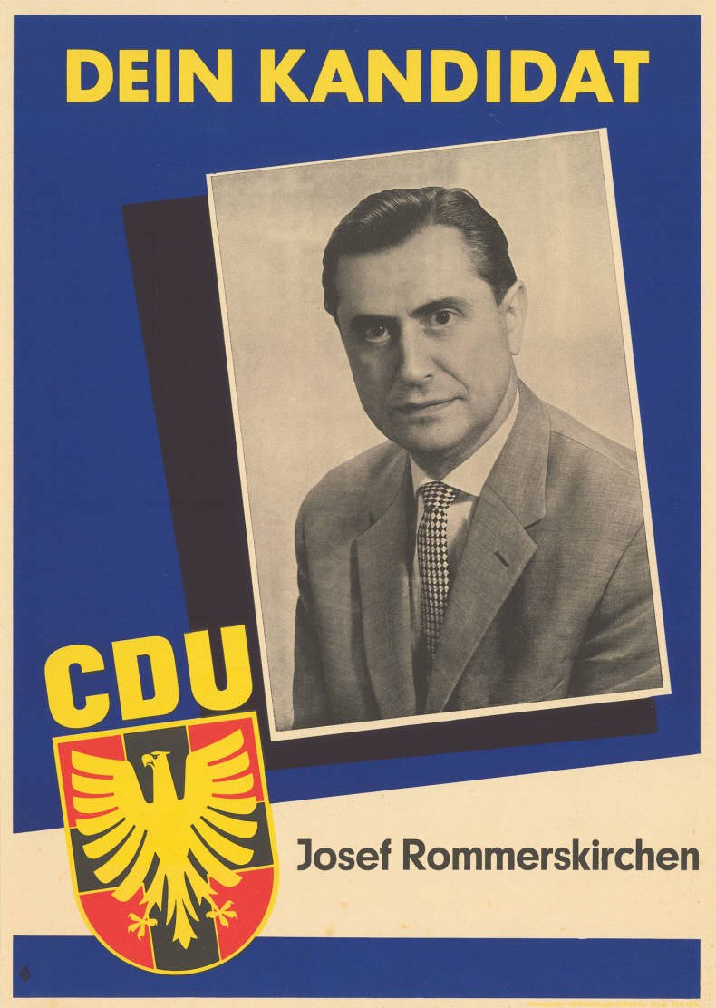 Dein Kandidat CDU Josef Rommerskirchen Abbildung: Porträtfoto - CDU-Logo Plakatart: Kandidaten-/Personenplakat mit Porträt Auftraggeber: CDU-Bundesgeschäftsstelle Drucker_Druckart_Druckort: KVD, Köln Objekt-Signatur: 10-009 : 341 Bestand: Landtagswahlplakate Nordrhein-Westfalen (10-009) GliederungBestand10-18: Landtagswahlplakate Nordrhein-Westfalen (10-009) » Landtagswahl am 27.6.1954 » CDU » mit Porträt-Foto Lizenz: KAS/ACDP 10-009 : 341 CC-BY-SA 3.0 DE